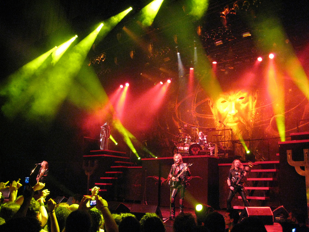 Emiliàn e rumagnòl: I Judas Priest dal viṿ a 'l "Credicard Hall" ad San Paulo